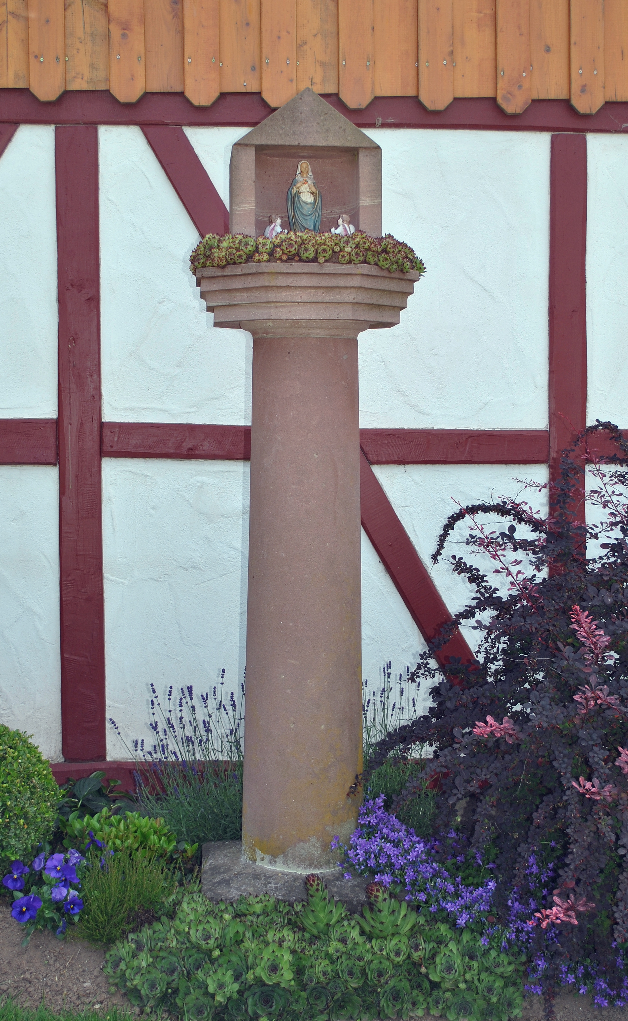 Moderner Bildstock an der Römerstrasse in Hesselbach